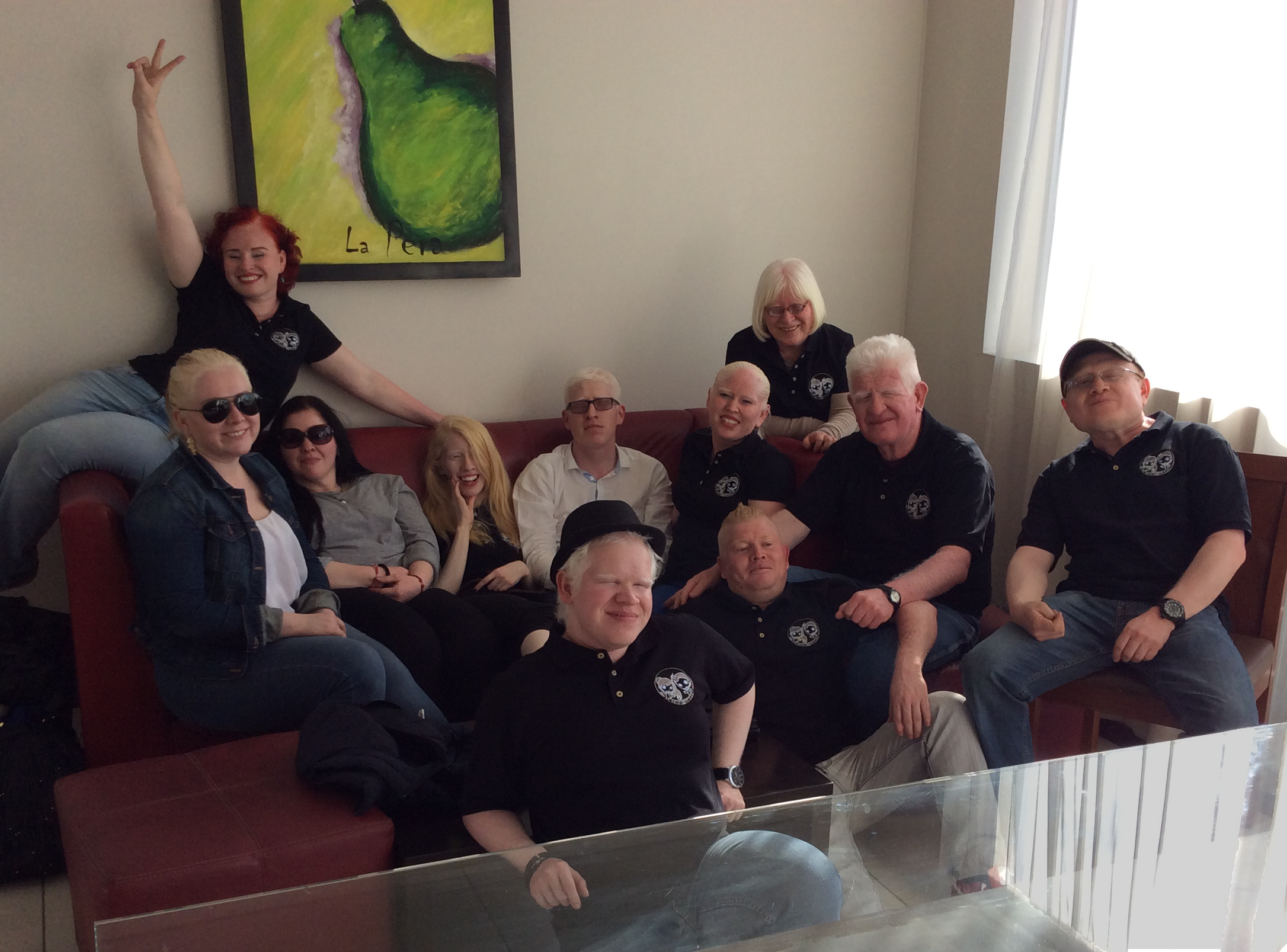 reunion organizada por albino latino.